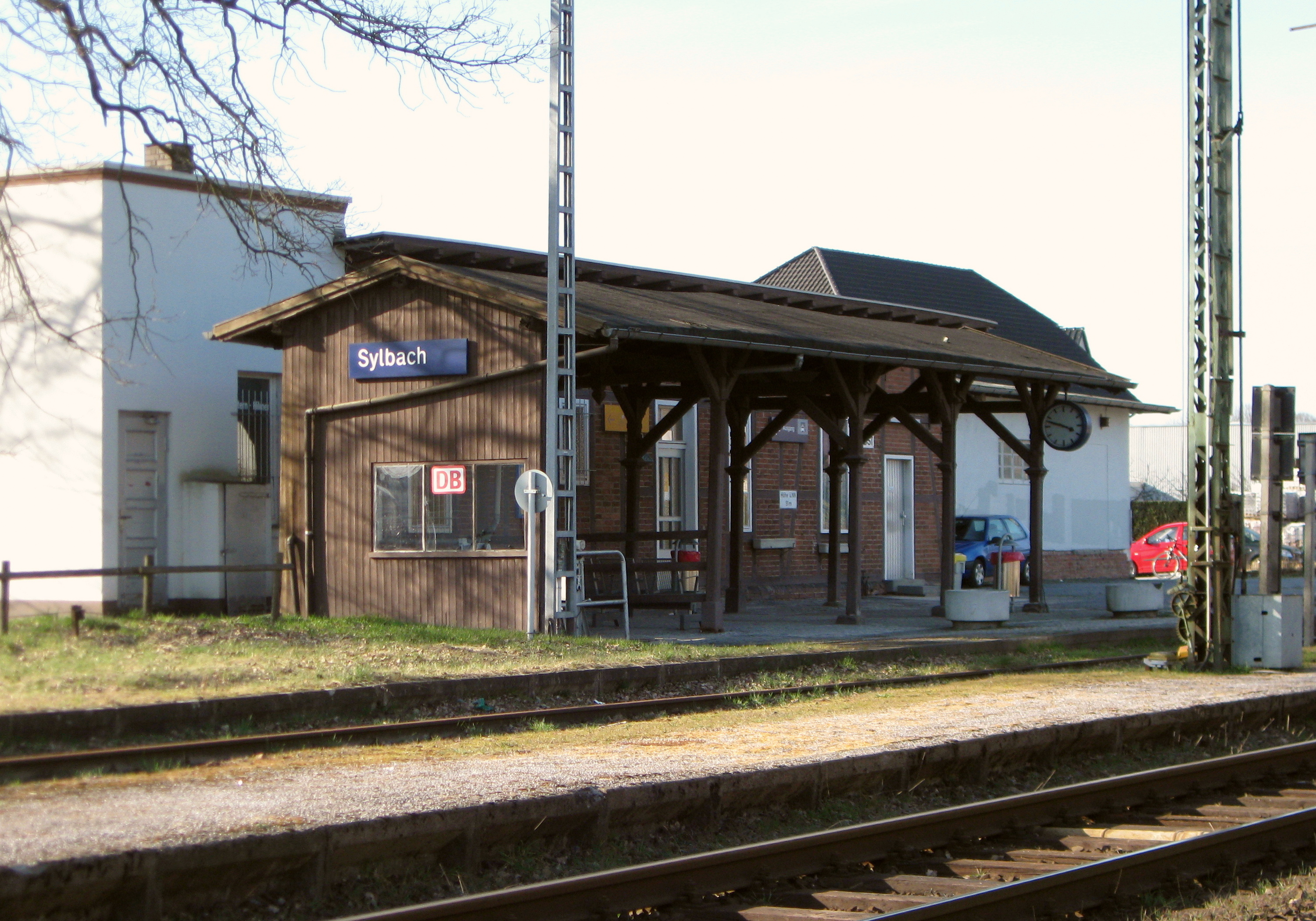 Bad Salzuflen, Haltepunkt Sylbach. Holzgebäude mit mechanischen Anlagen für die bis heute (2011) von Hand betriebene Bahnschranke unter Denkmalschutz.